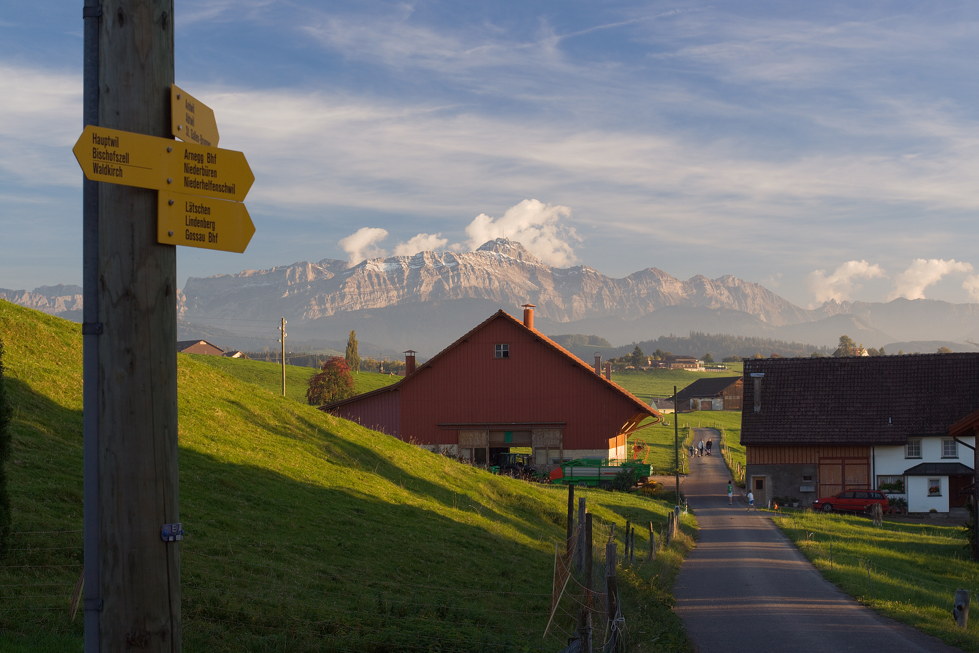 Der Alpstein mit Säntis als höchstem Berg, von Oberarnegg, Gemeinde Andwil (SG), Schweiz gesehen. Aufnahme mit Polarisationsfilter